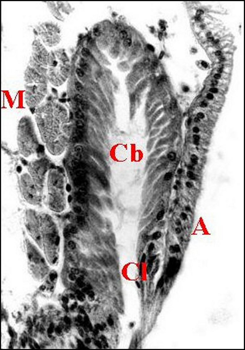 Rostre de Diguetia canities renfermant la glande rostrale vue en coupe histologique longitudinale.